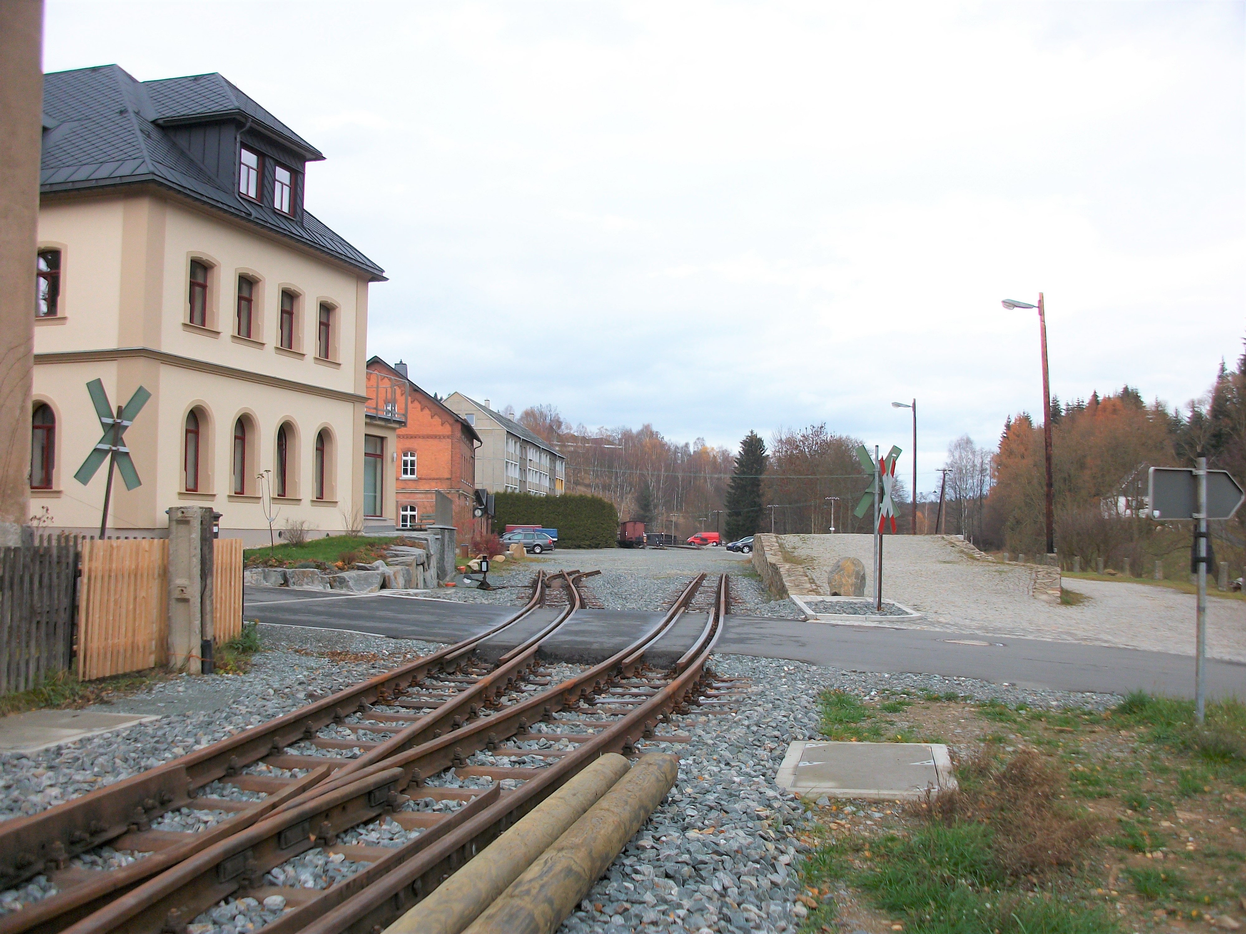 Bahnhof Jöhstadt, im Jahr 2018 rekonstruiertes Gleis bei Laderampe und Bahnübergang (2018)